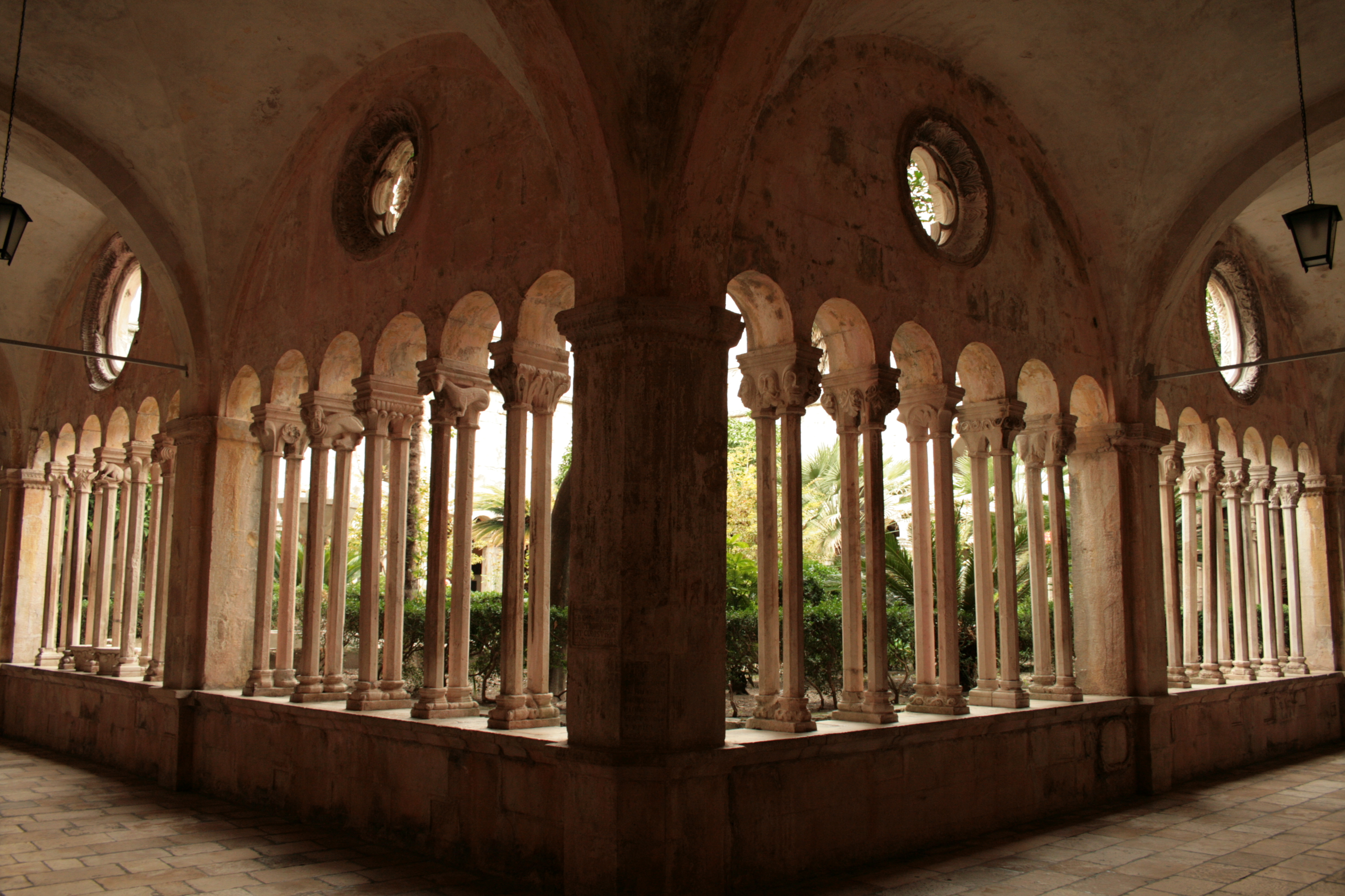 Внутренняя галерея Францисканского монастыря Дубровника, Хорватия